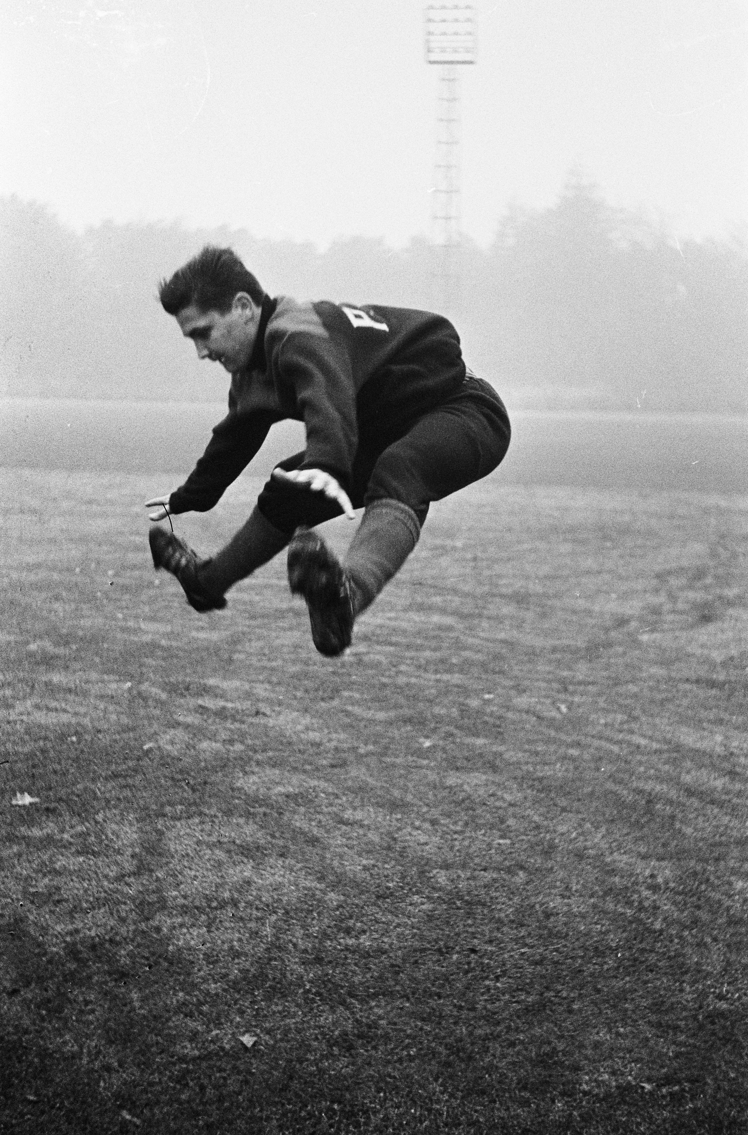 Collectie / Archief : Fotocollectie Anefo Reportage / Serie : [ onbekend ] Beschrijving : Training Nederlands elftal te Zeist. Piet Giesen in aktie tijdens training Datum : 29 oktober 1963 Locatie : Utrecht, Zeist Trefwoorden : elftallen, sport, trainingen, voetbal Fotograaf : Koch, Eric / Anefo Auteursrechthebbende : Nationaal Archief Materiaalsoort : Negatief (zwart/wit) Nummer archiefinventaris : bekijk toegang 2.24.01.05 Bestanddeelnummer : 915-6841